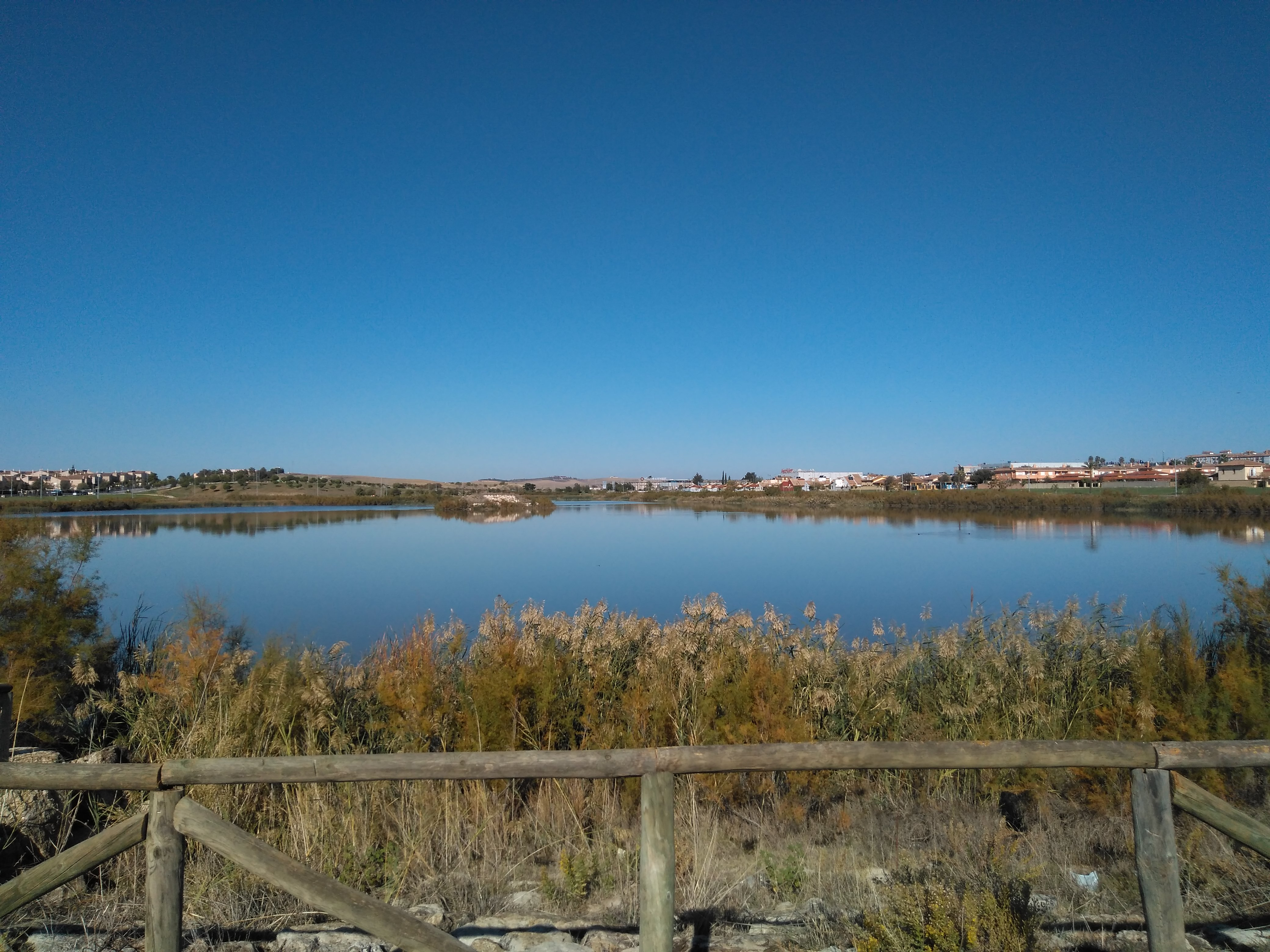 Laguna de Torrox desde la división de los dos bolsas, Jerez de la Frontera